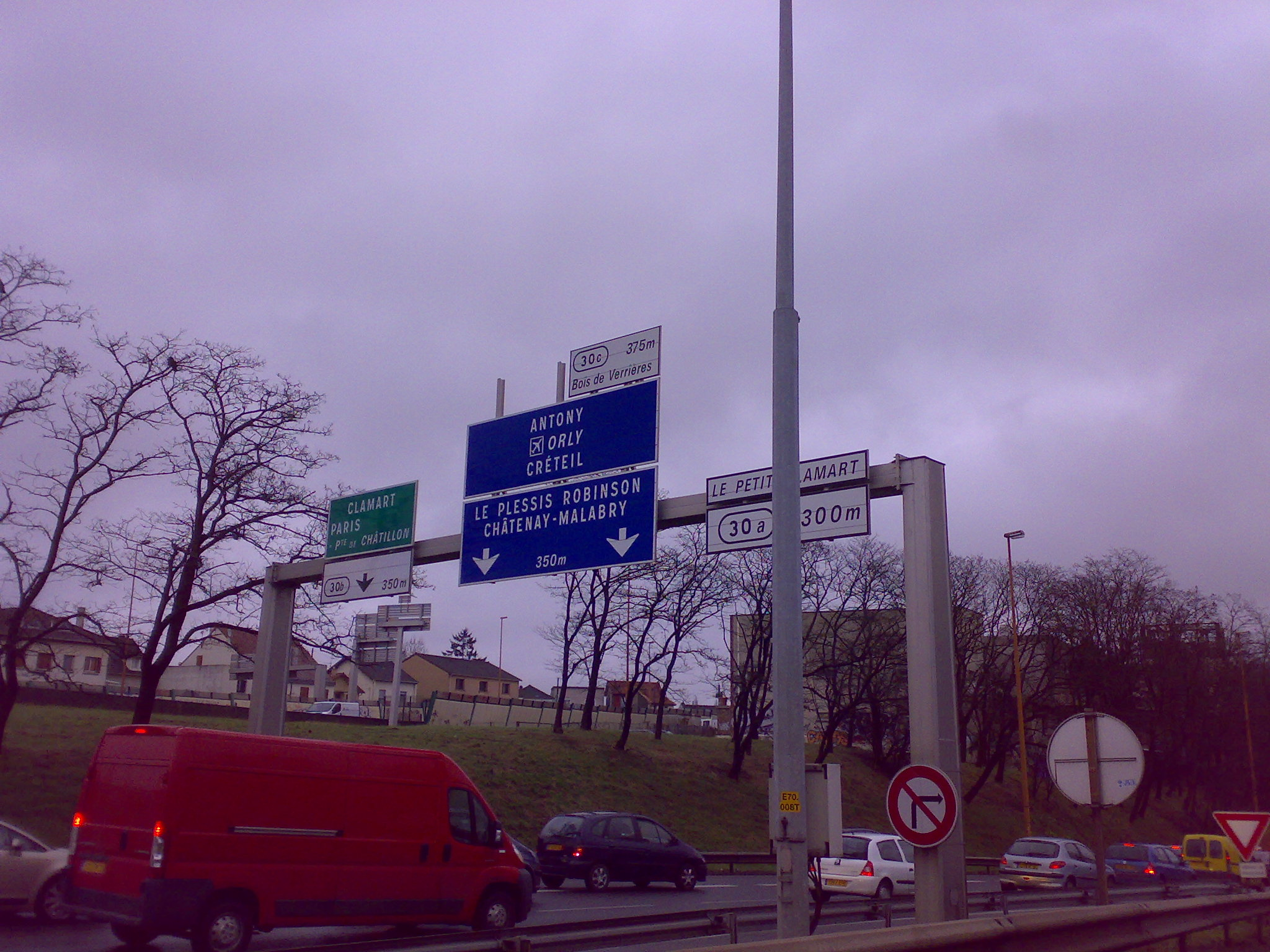 A86 Sud